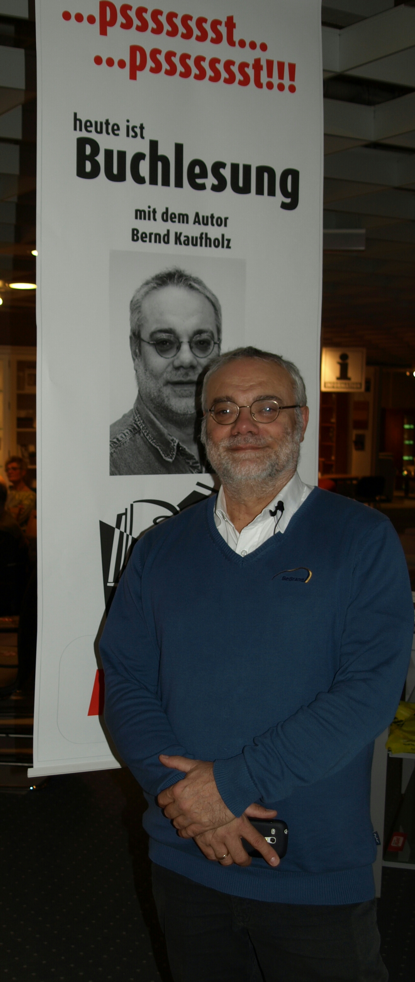 Bernd Kaufholz liest am 29. November 2014 bei Porta in Stendal